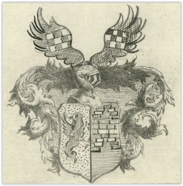 Armoiries de la famille balte (von) BUCHOW ou BUCHAU.